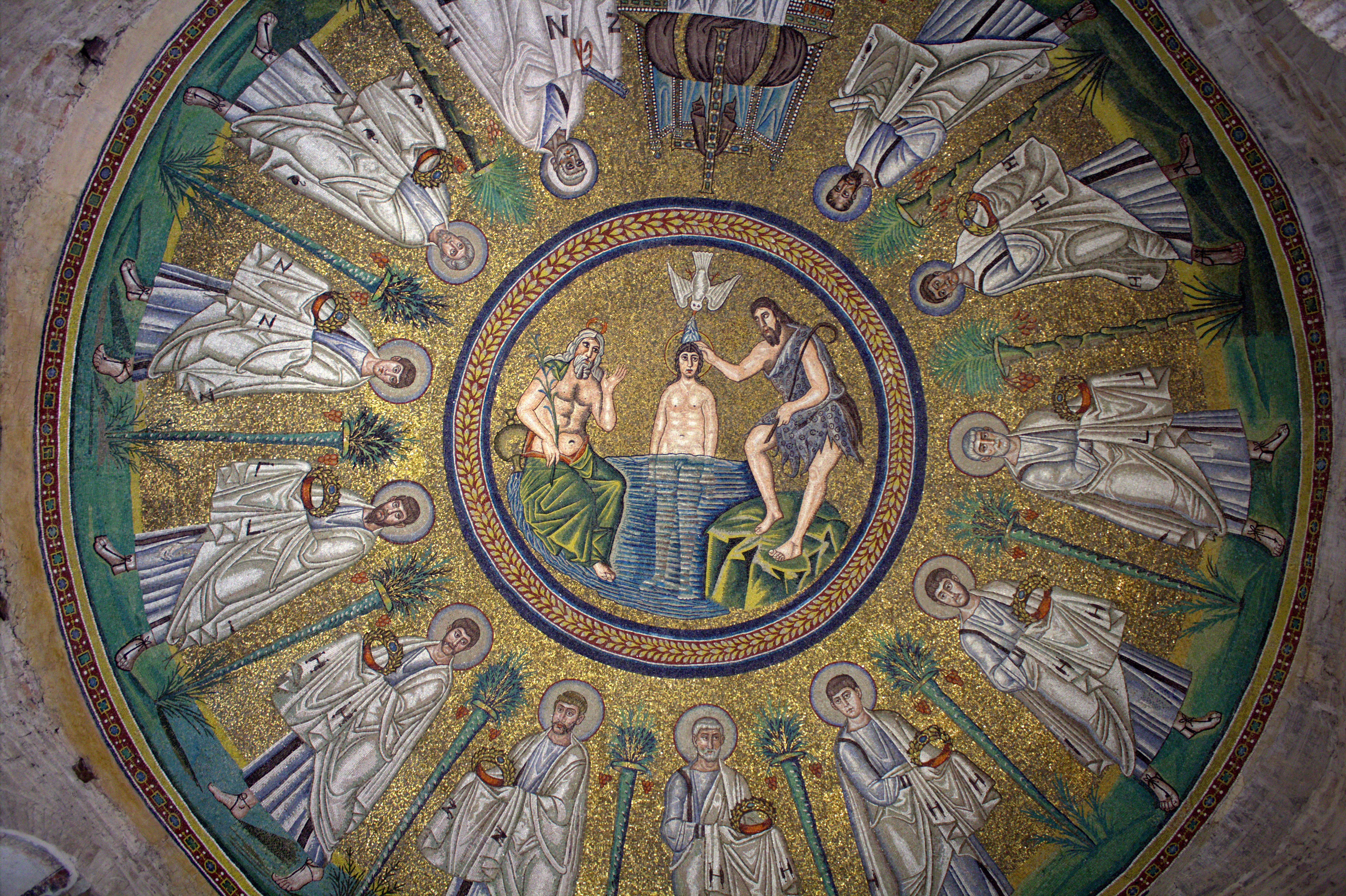 Soffitto del Battistero degli Ariani, Ravenna